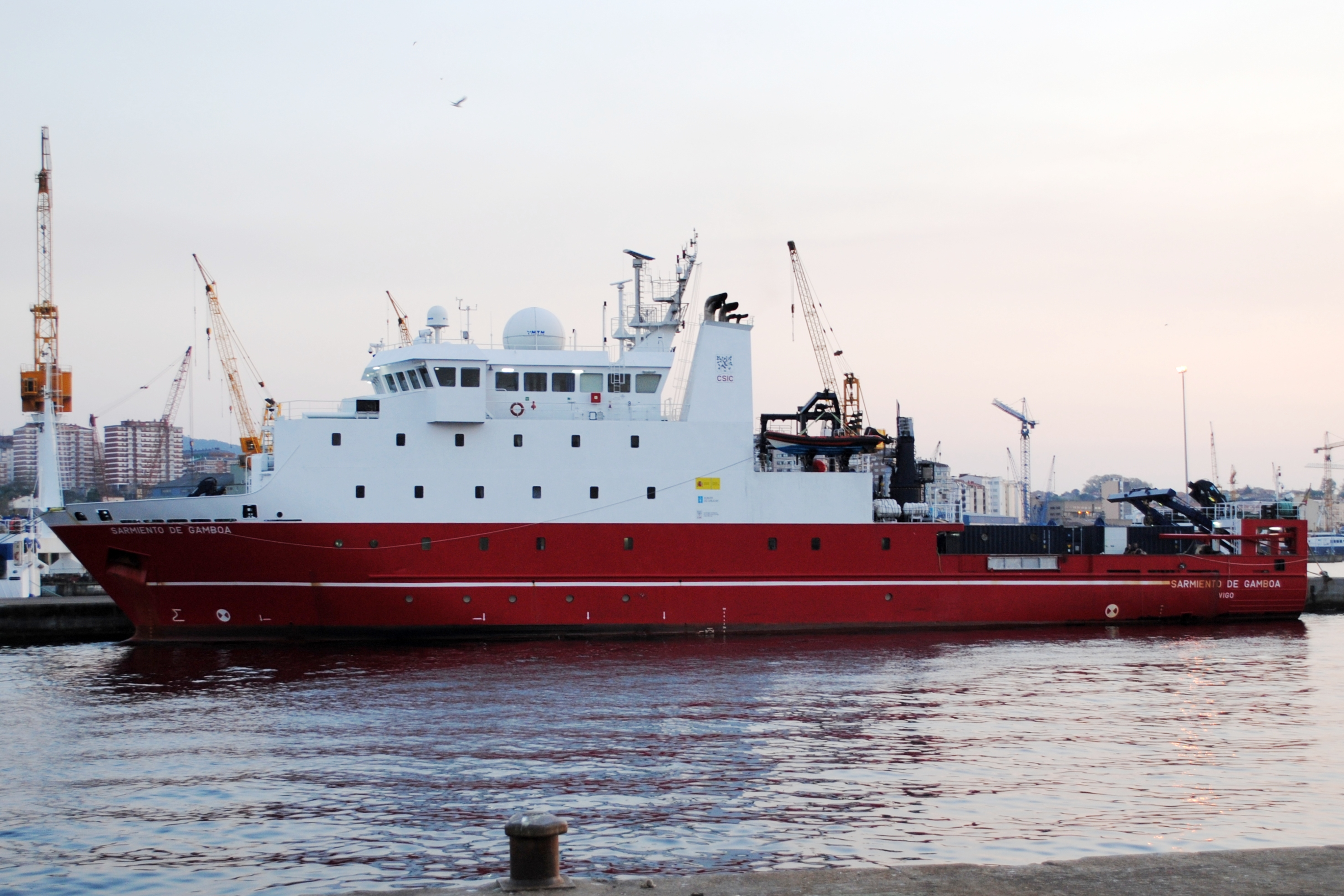 Buque Oceanográfico Sarmiento de Gamboa (IMO 9335238) no porto de Vigo.